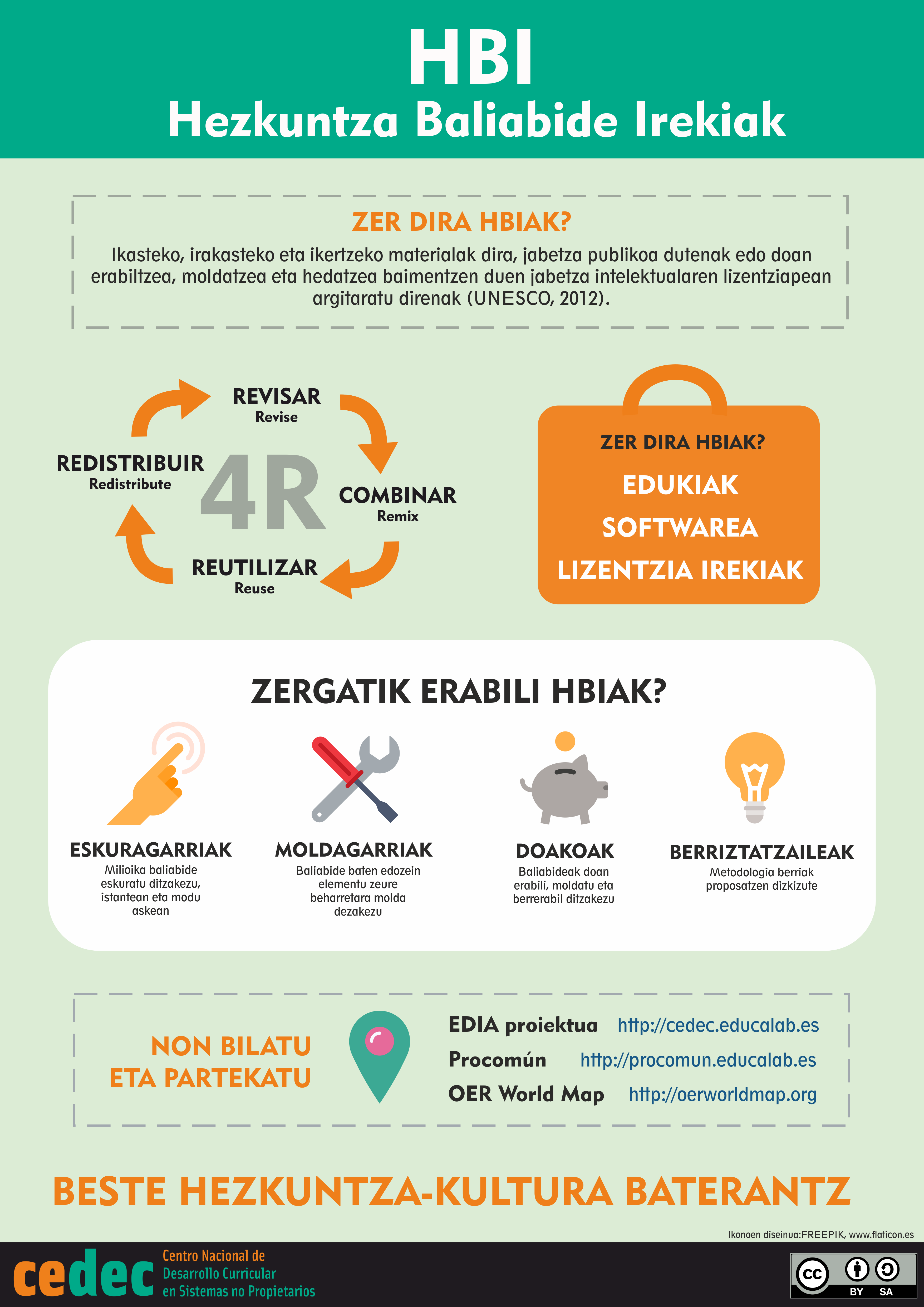 Hezkuntza Baliabide Irekiak. HBI. Zergatik erabili HBIak. Argudioak.